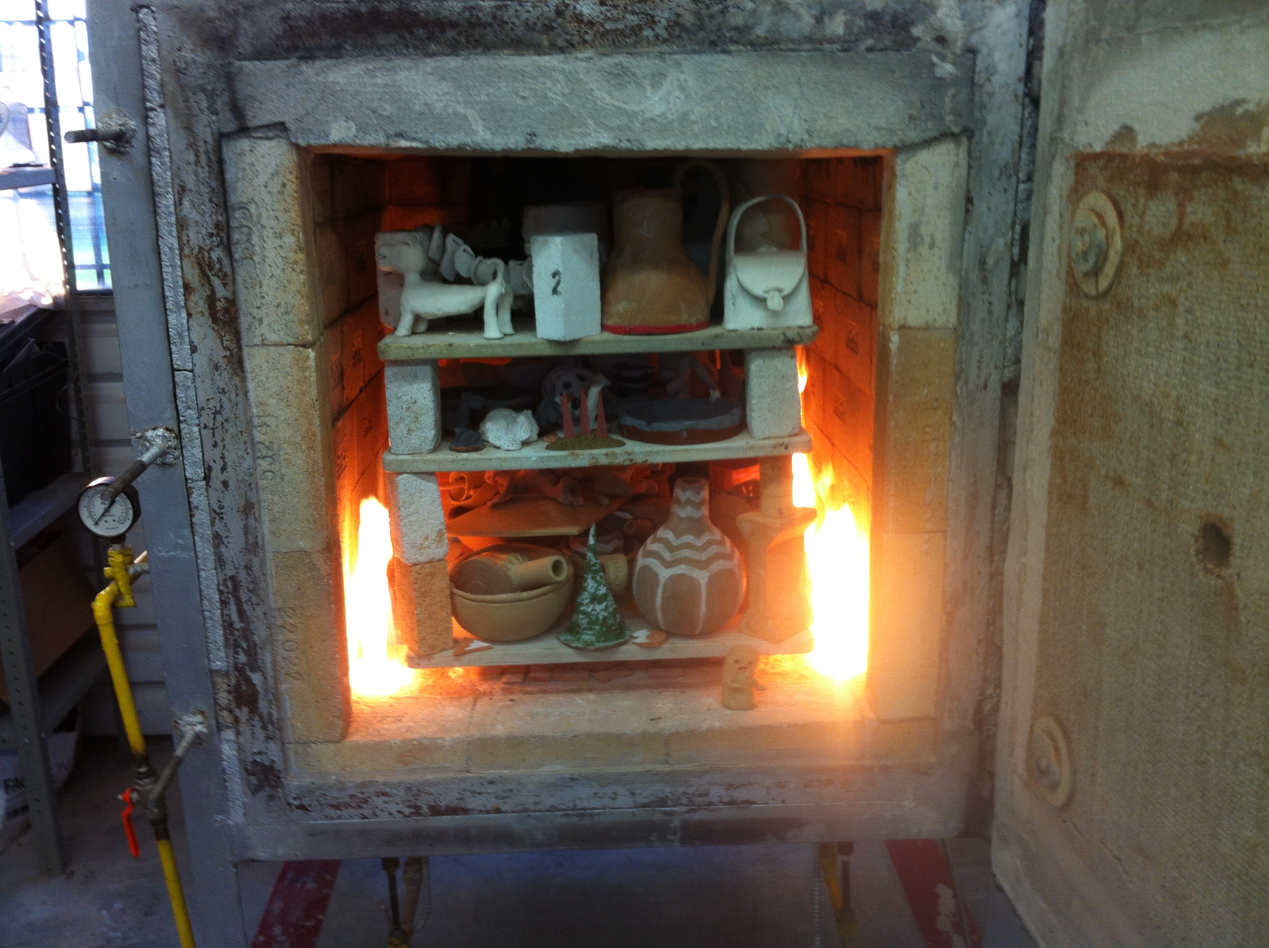 Vista del Horno ya cargado a su máxima capacidad, momentos antes de cerrar la puerta, donde las piezas se quemarán durante varias horas a distintas temperaturas controladas.